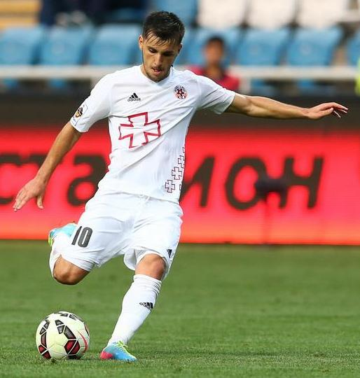 Флорентін Матей - футболіст Волині